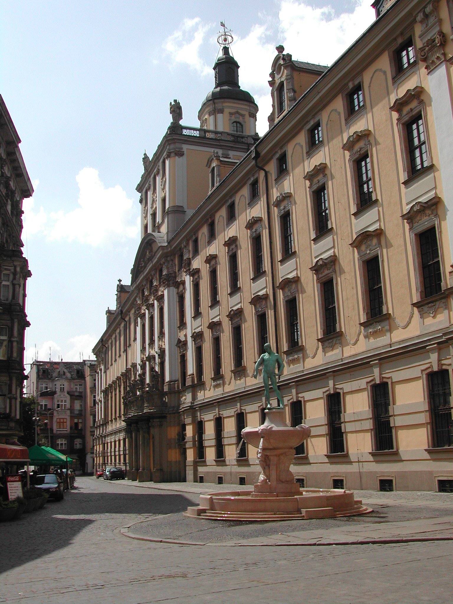 Plac Uniwersytecki we Wrocławiu - budynek Uniwersytetu Wrocławskiego oraz pomnik szermierza